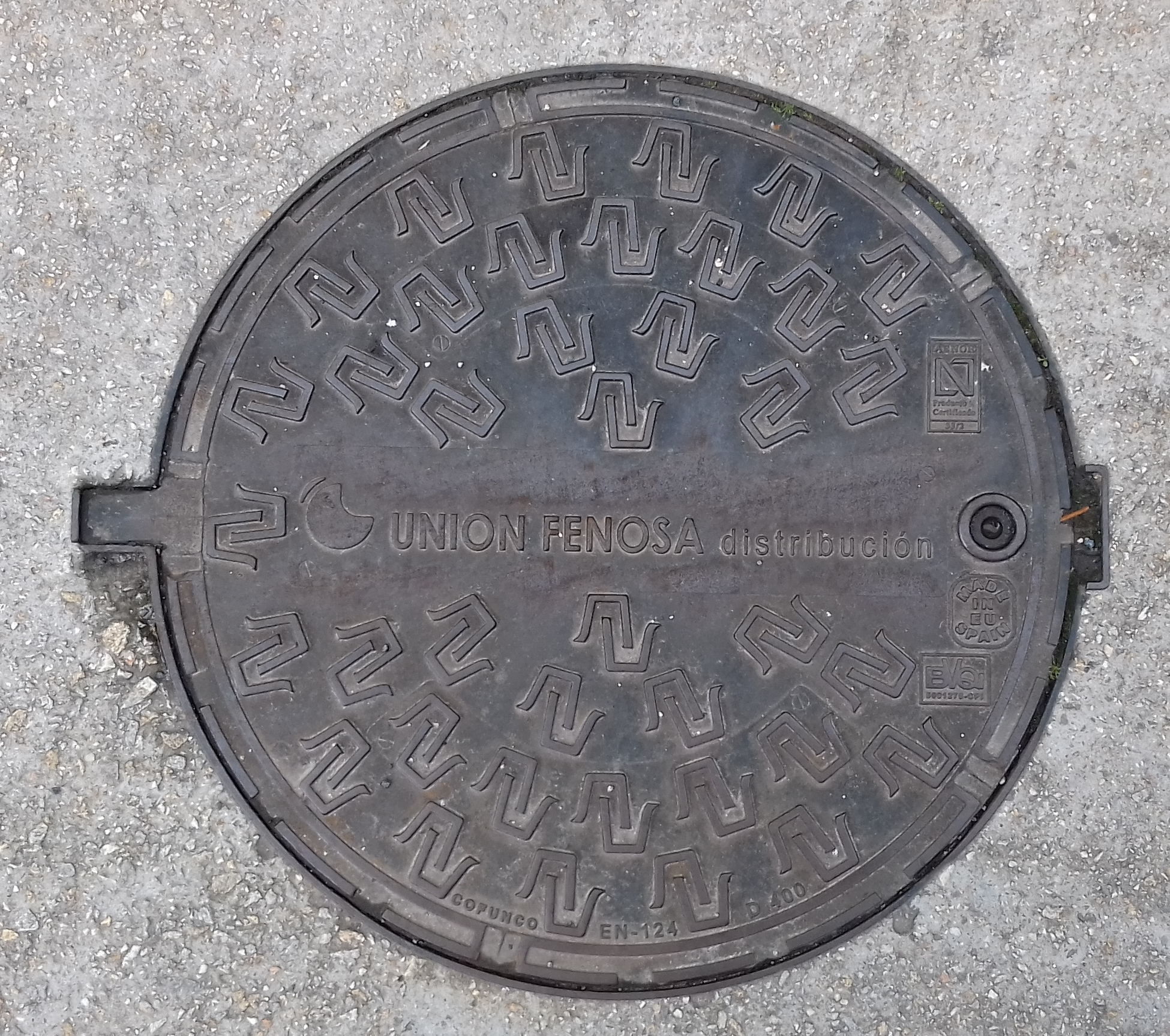 Tapa de rexistro de Unión Fenosa en Santiago de Compostela